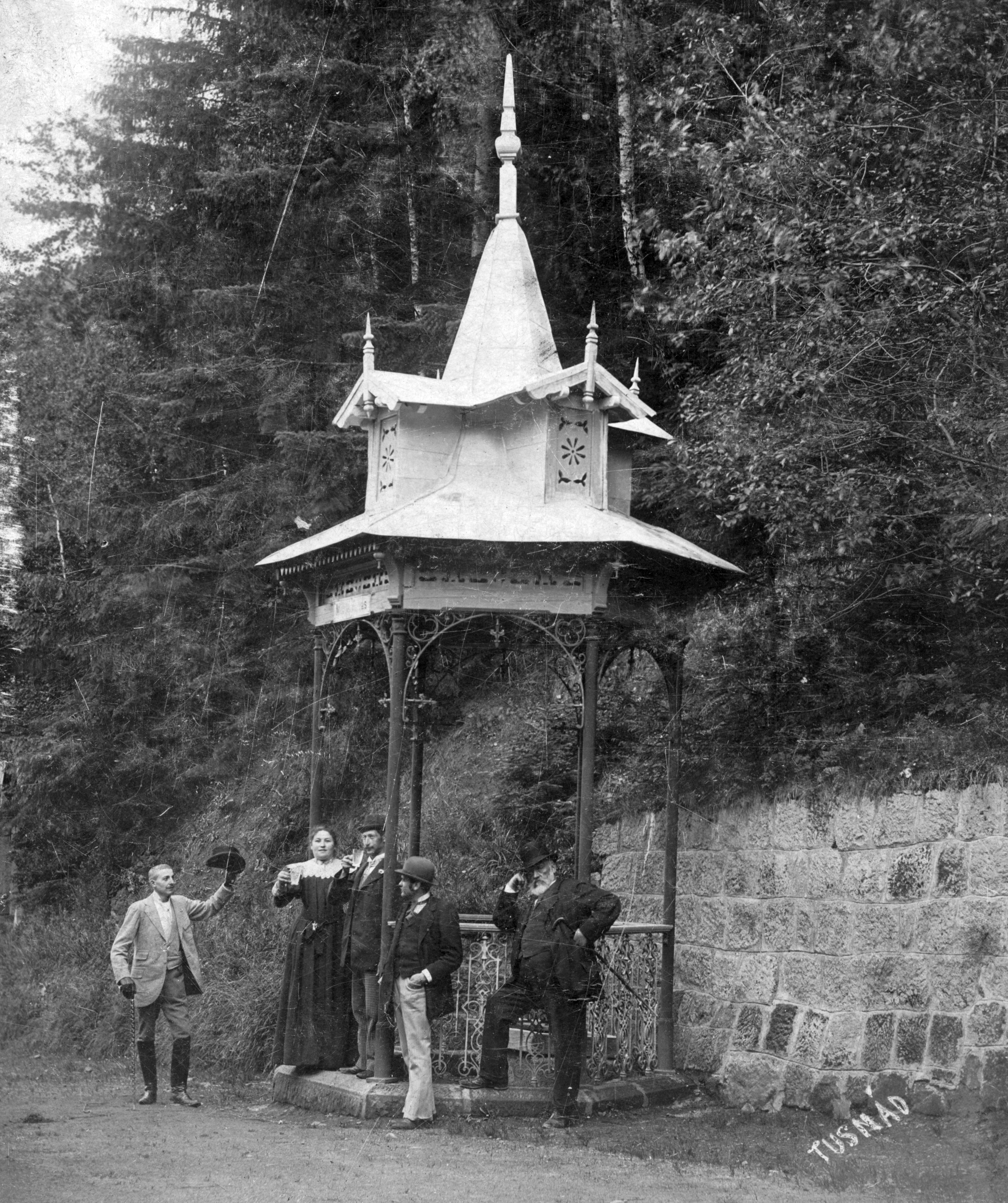 ERDÉLY TUSNÁDFÜRDŐ Mikes-forrás.